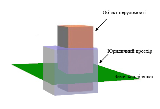 Обєкти, що реєструє тривимірний (3D) кадастр